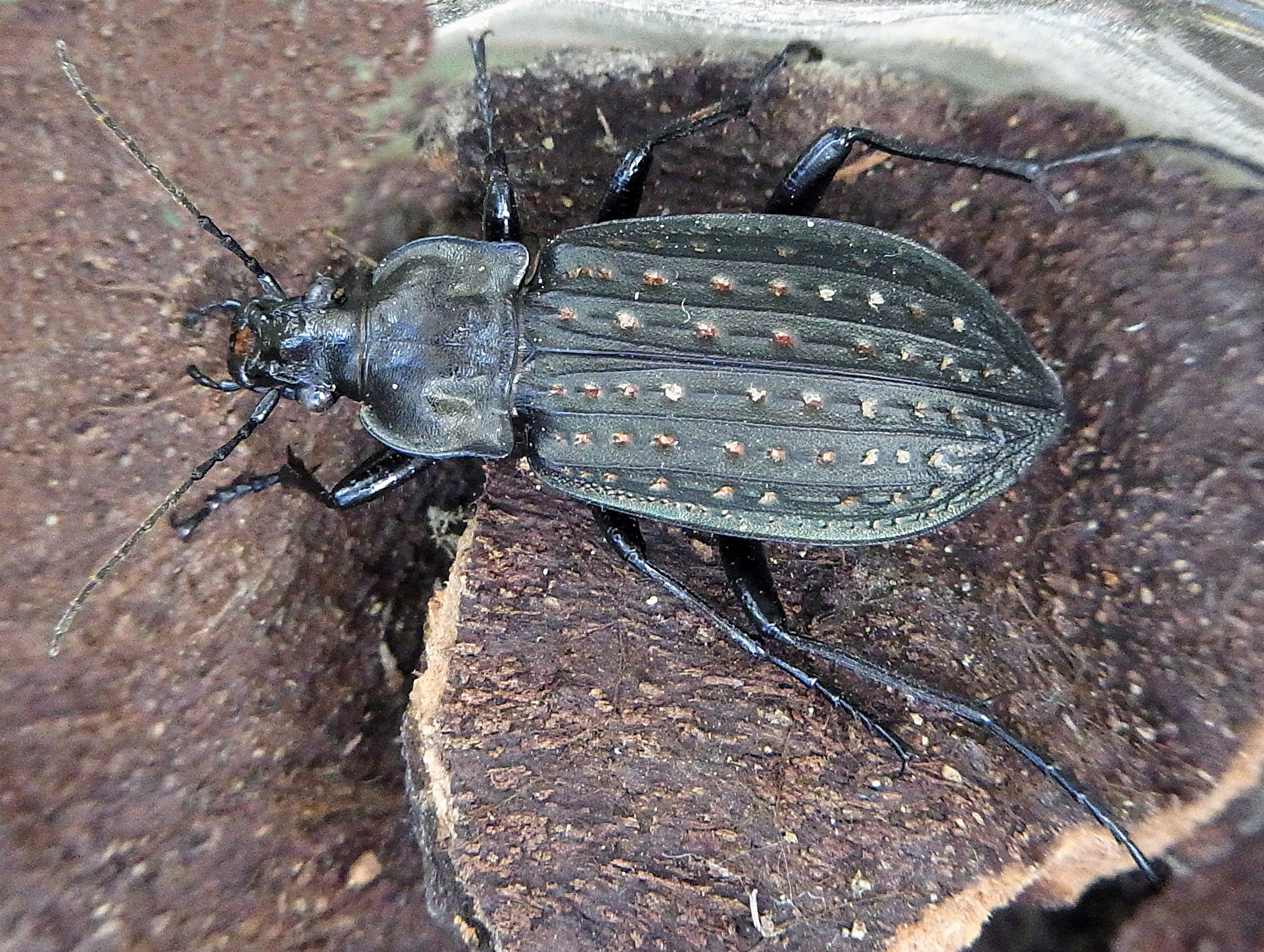 Carabus clathratus von Ungarn, Theiss-Ufer bei Kötelek nordöstlich Szolnok unter der Rinde einer toten Weide in Flussaue.